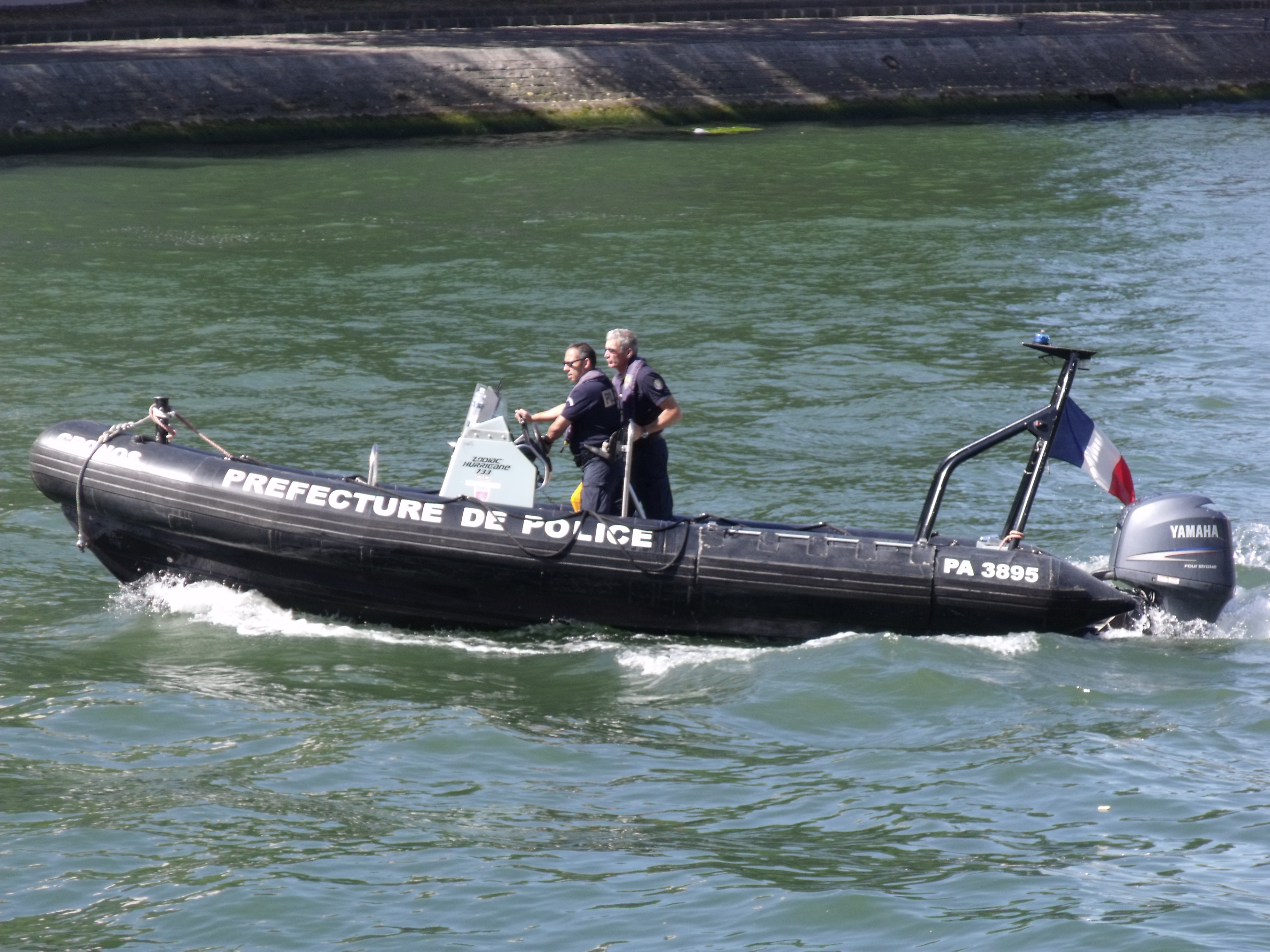 Utilisé par la Brigade Fluviale de Paris.